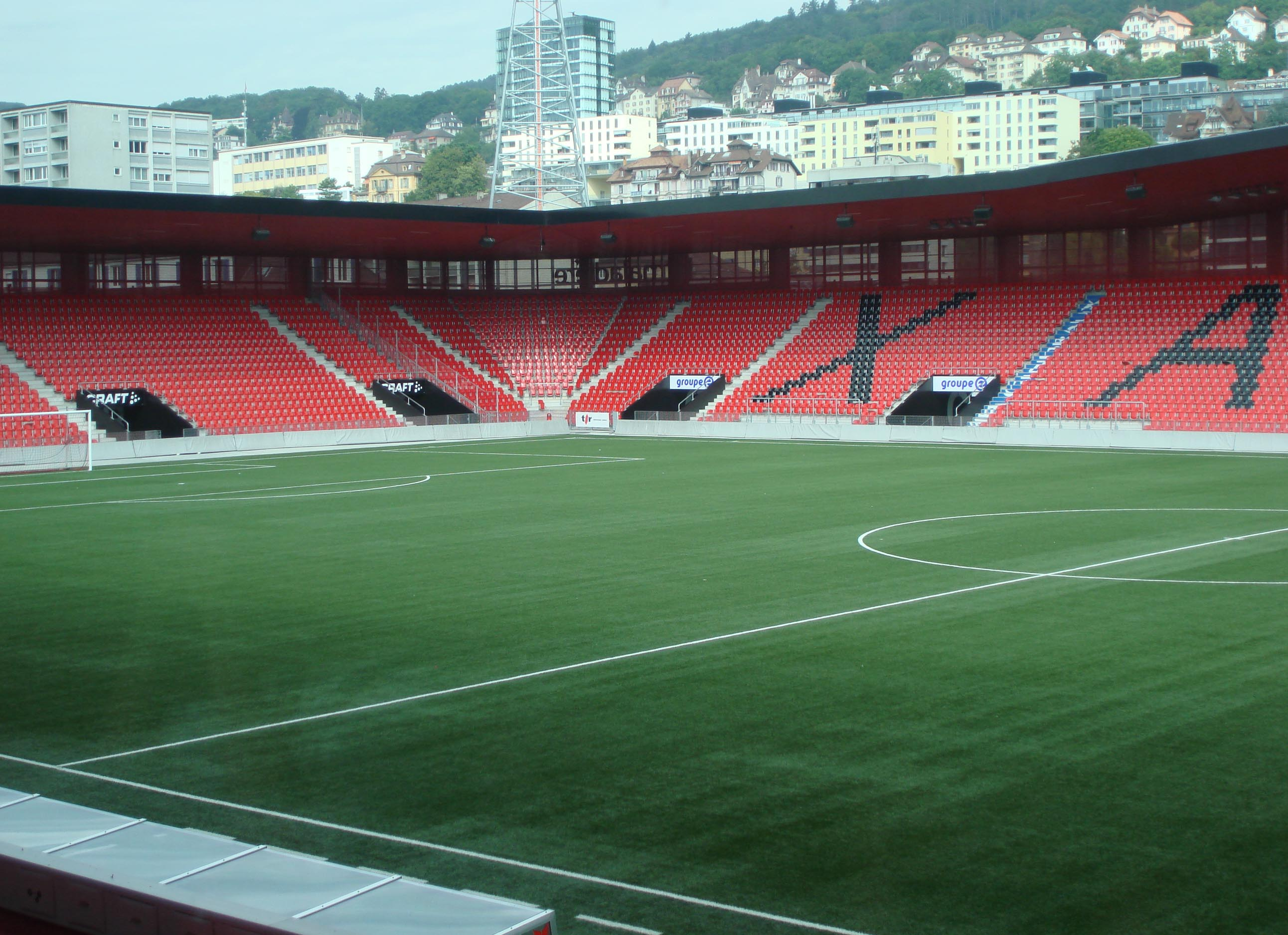 La Maladiere, Neuenburg